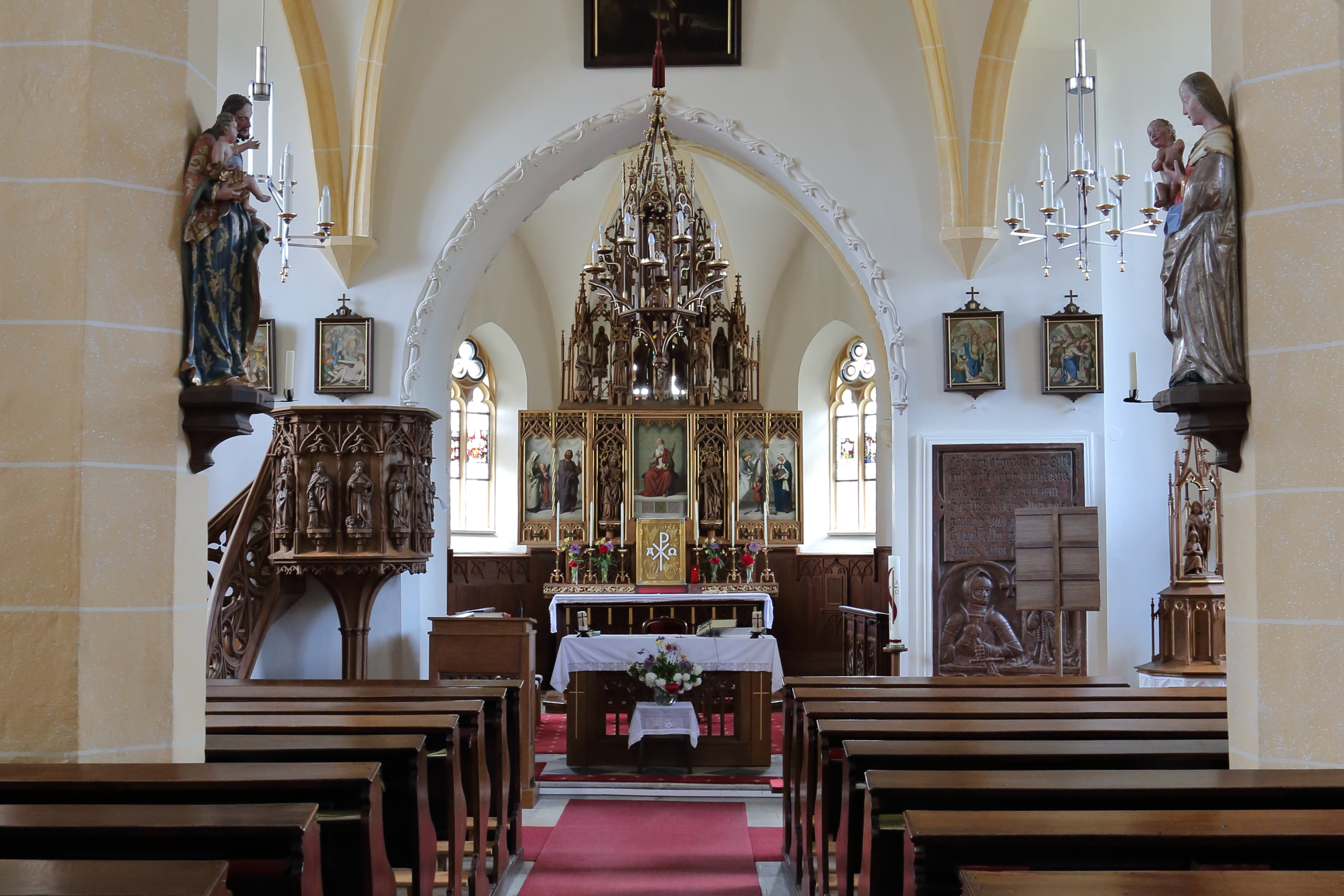 Innenansicht der röm.-kath. Pfarrkirche hl. Andreas in der niederösterreichischen Gemeinde Seebenstein.Sie befindet sich auf einem Hügel in der Ortsmitte und ist von Resten einer mittelalterlichen Bruchsteinmauer umgeben. Das Langhaus, ein spätgotischer Zweistützenraum, wurde im ersten Drittel des 16. Jahrhunderts und der gotische Chor vor 1450 errichtet. Die teilweise regotisierte Einrichtung wurde nach Entwürfen von Josef Angeler aus Edlitz angefertigt. Die zahlreichen Rotmarmorgrabplatten aus der Zeit 1448 bis 1820 an der und in der Kirche sind Grabdenkmäler der Familien der Königberger und Pergen.